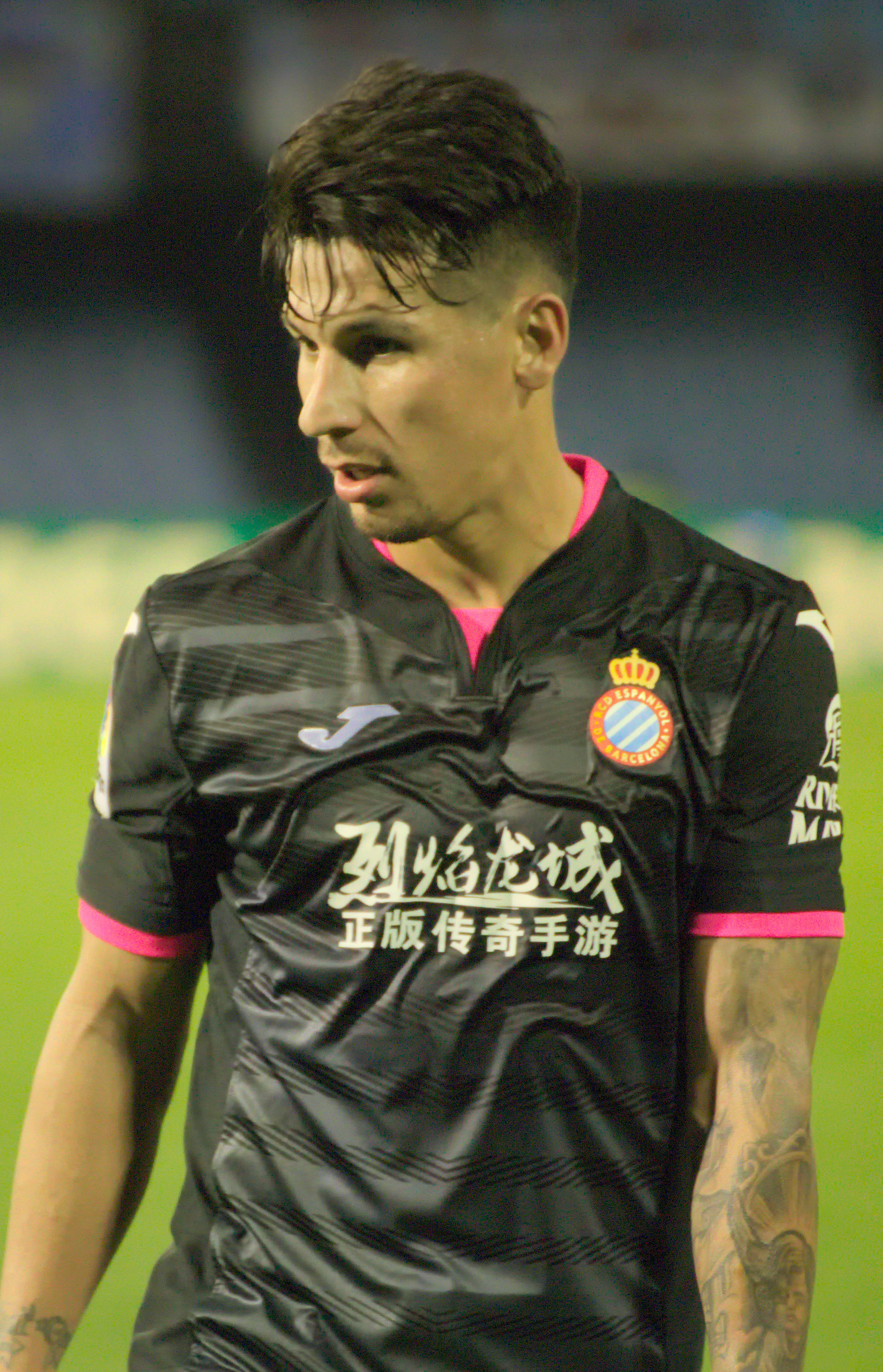 Hernán Pérez - RCD Espanyol